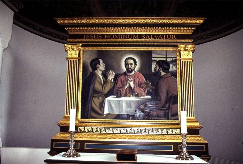 Esbjerg Vor Frelser Kirke i Danmark. Altertavle